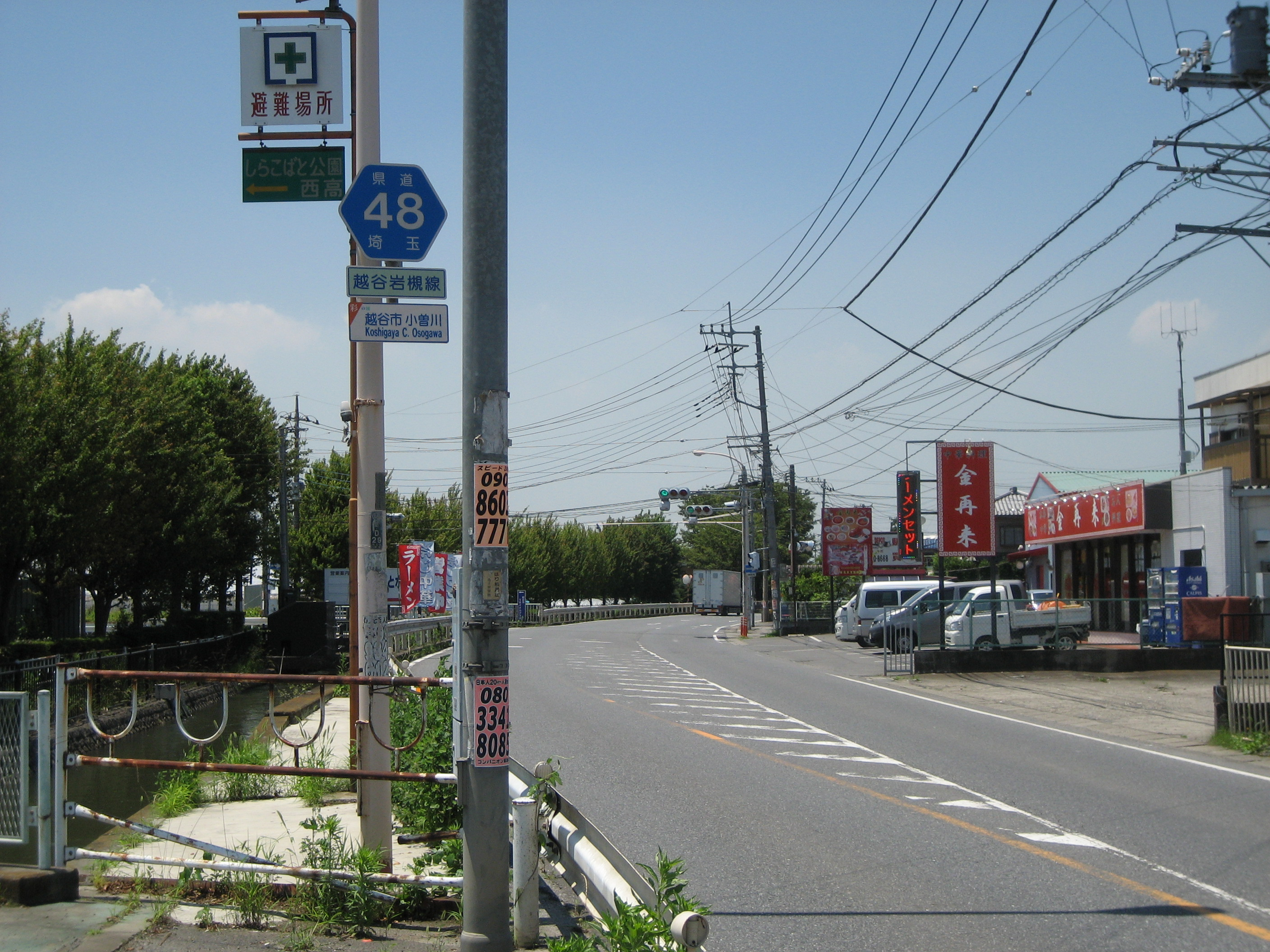 埼玉県道48号線越谷市しらこばと水上公園付近